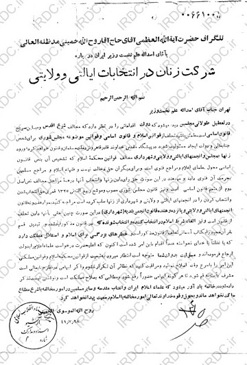 نامه ی امام خمینی به علم